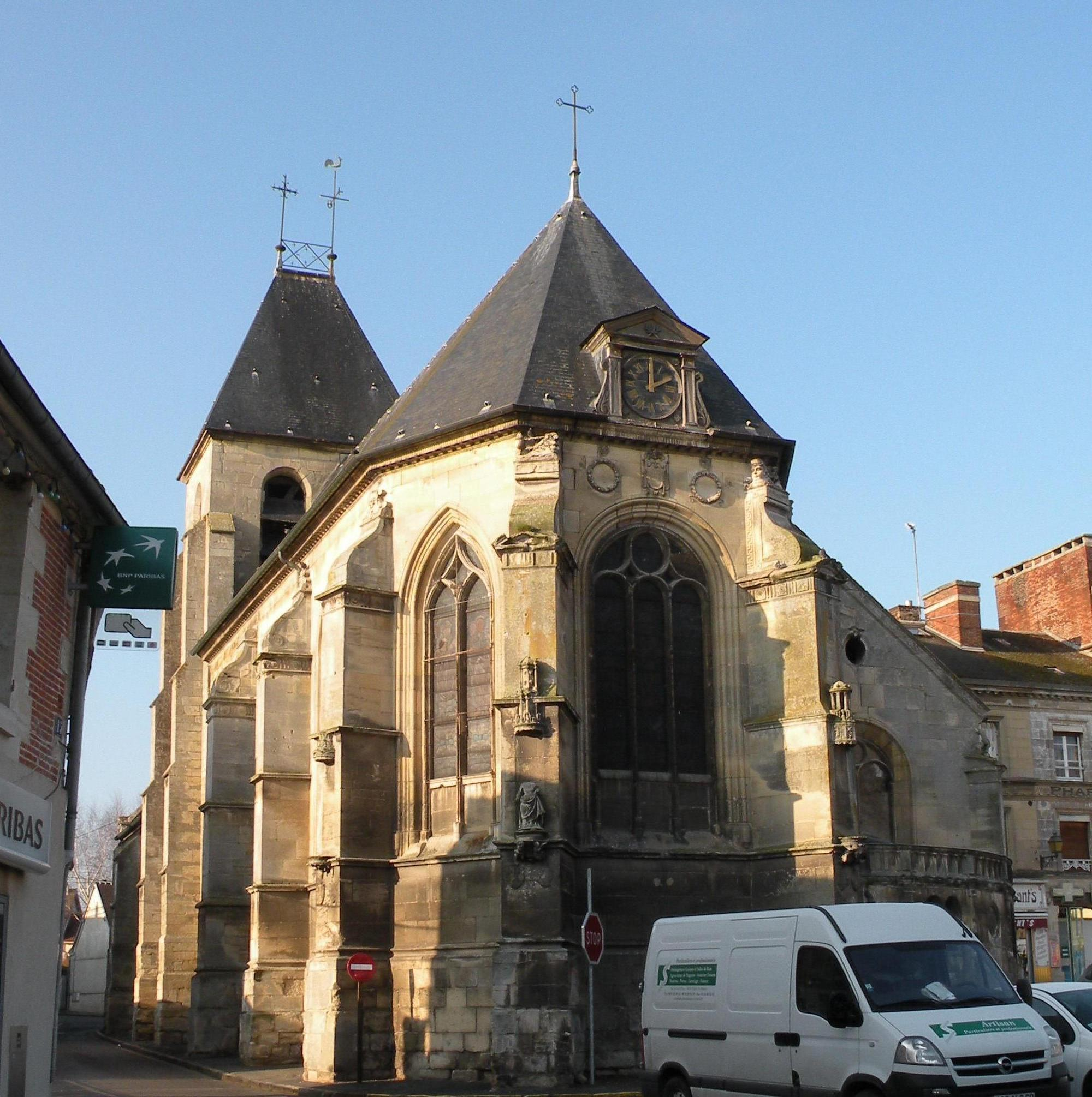 eglise de la commune de Neuilly-en-Thelle